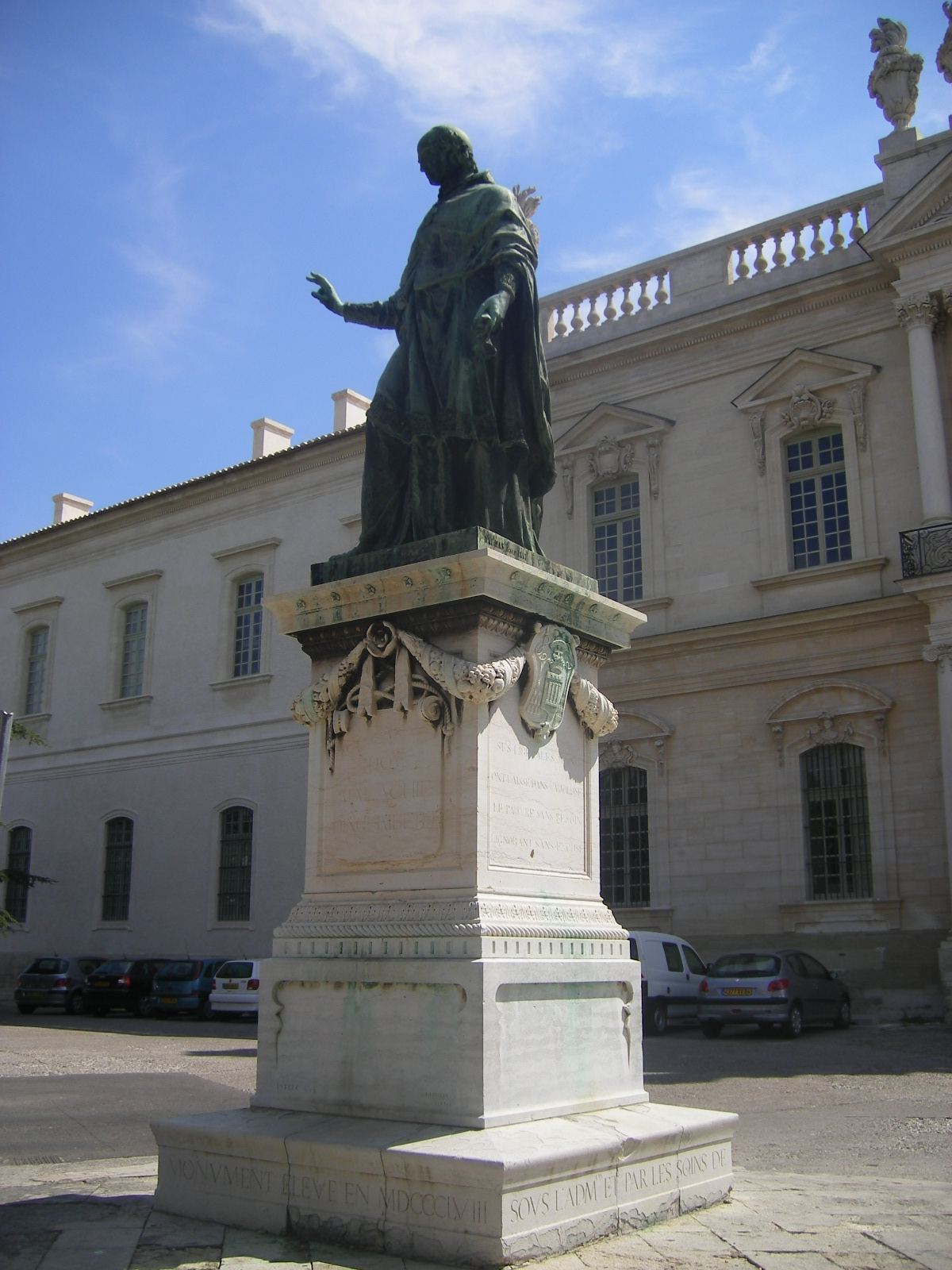 Carpentras